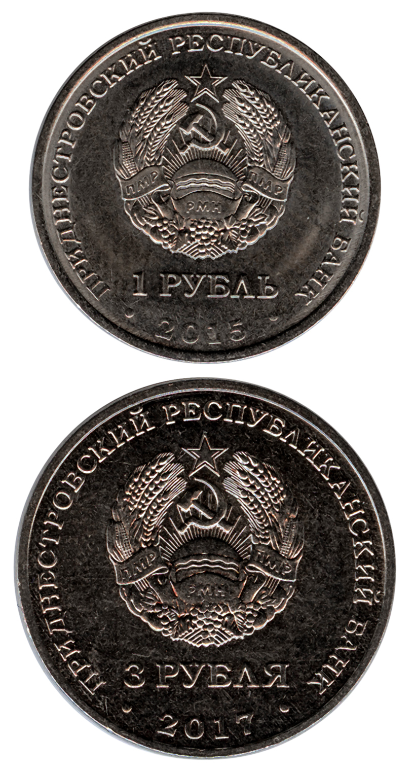 Kursmünzen 1 und 3 Rubel Prednistrojen Durchmesser 22 mm Masse 4,65 g 925er vernickelter Stahl Auflage: 50.000 Stück